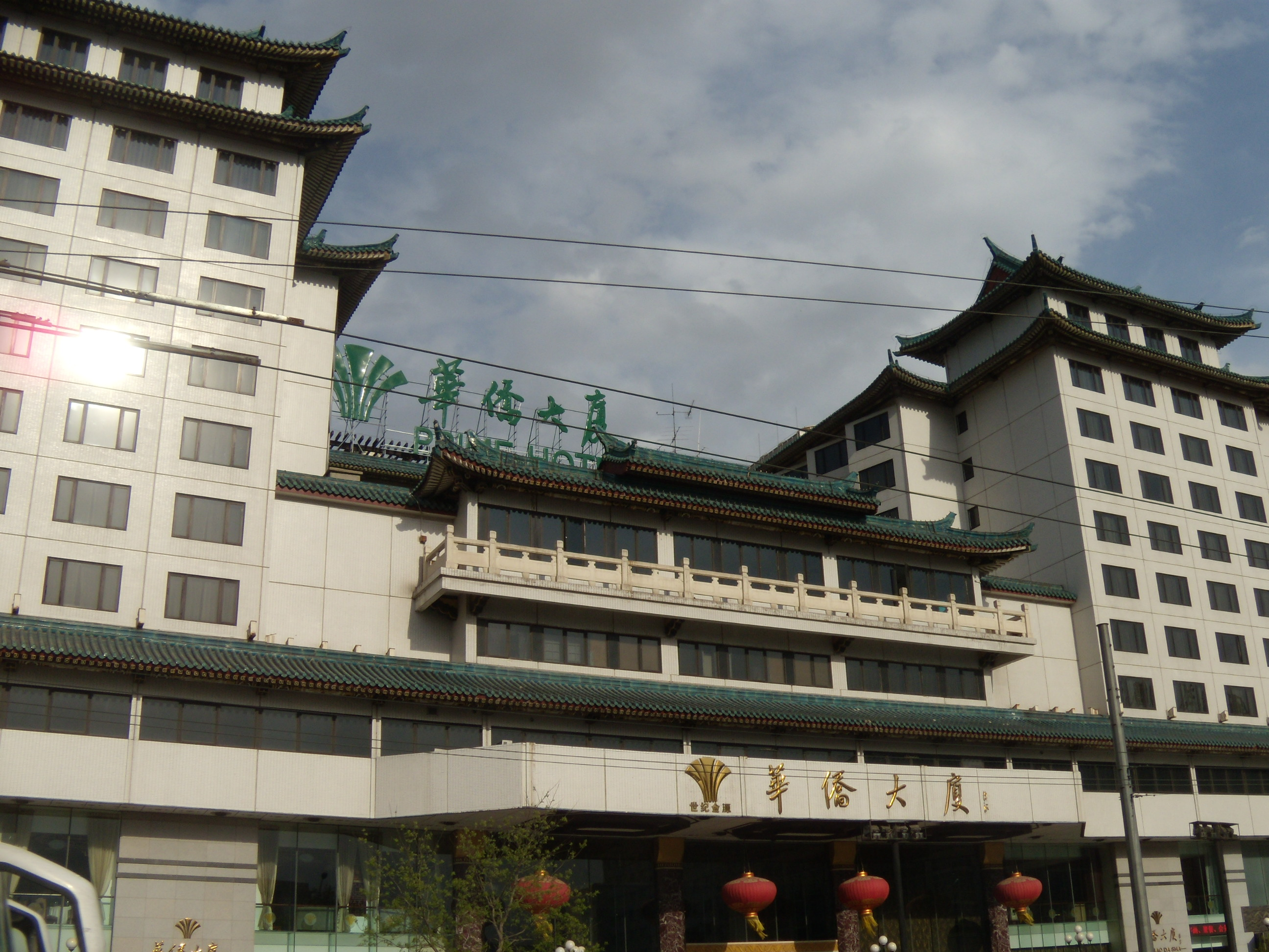 北京华侨大厦